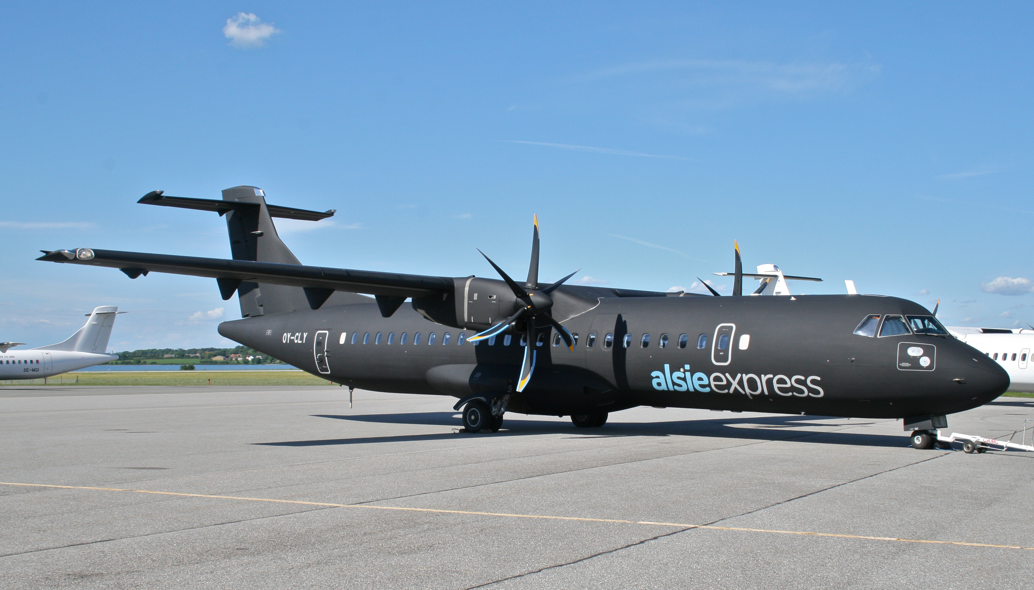 Alsie Express fly i Sønderborg Lufthavn.